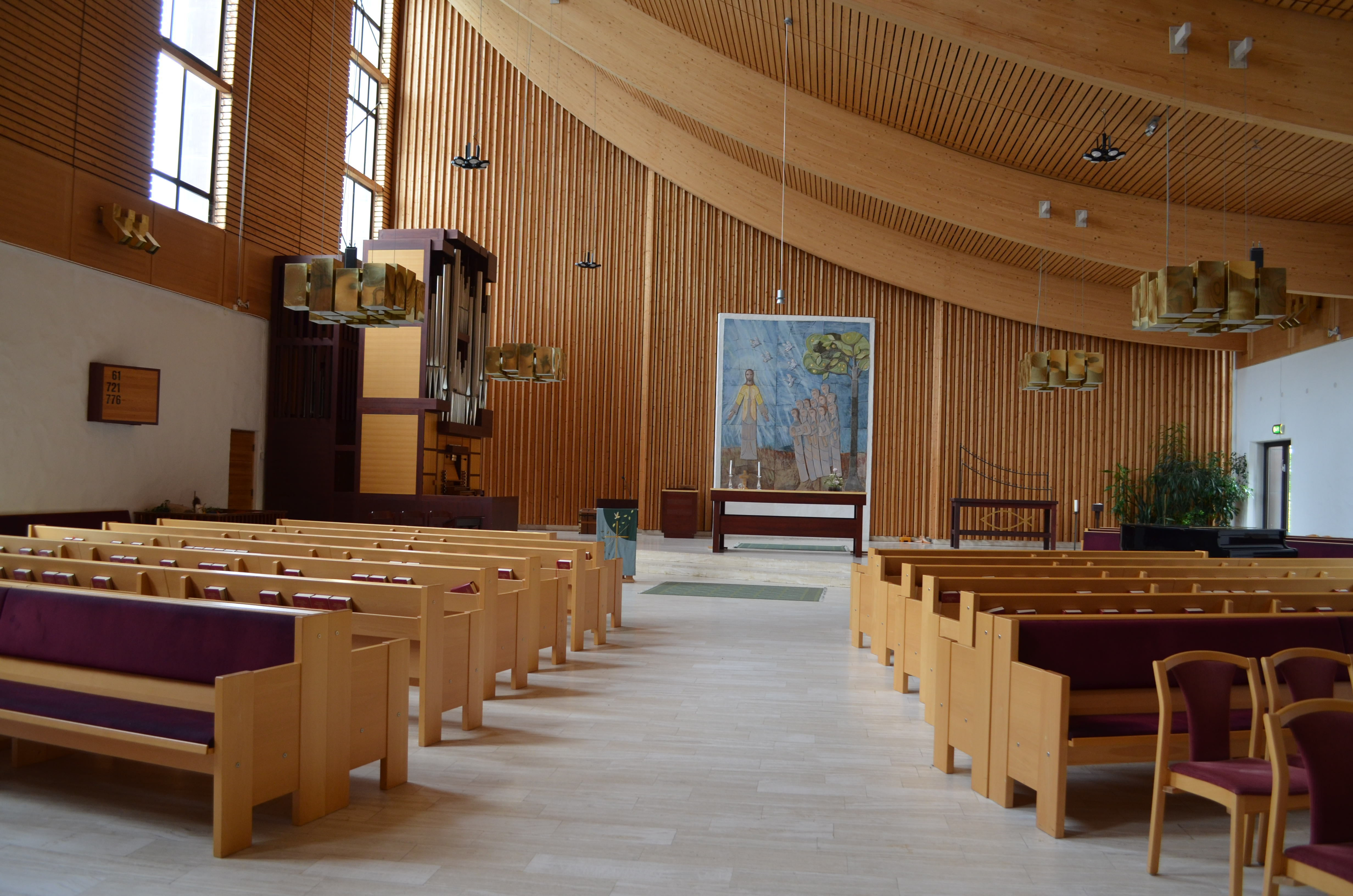 Skäggetorps kyrkas kyrkosal.